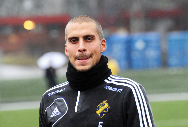 Panajotis Dimitriadis på en AIK träning